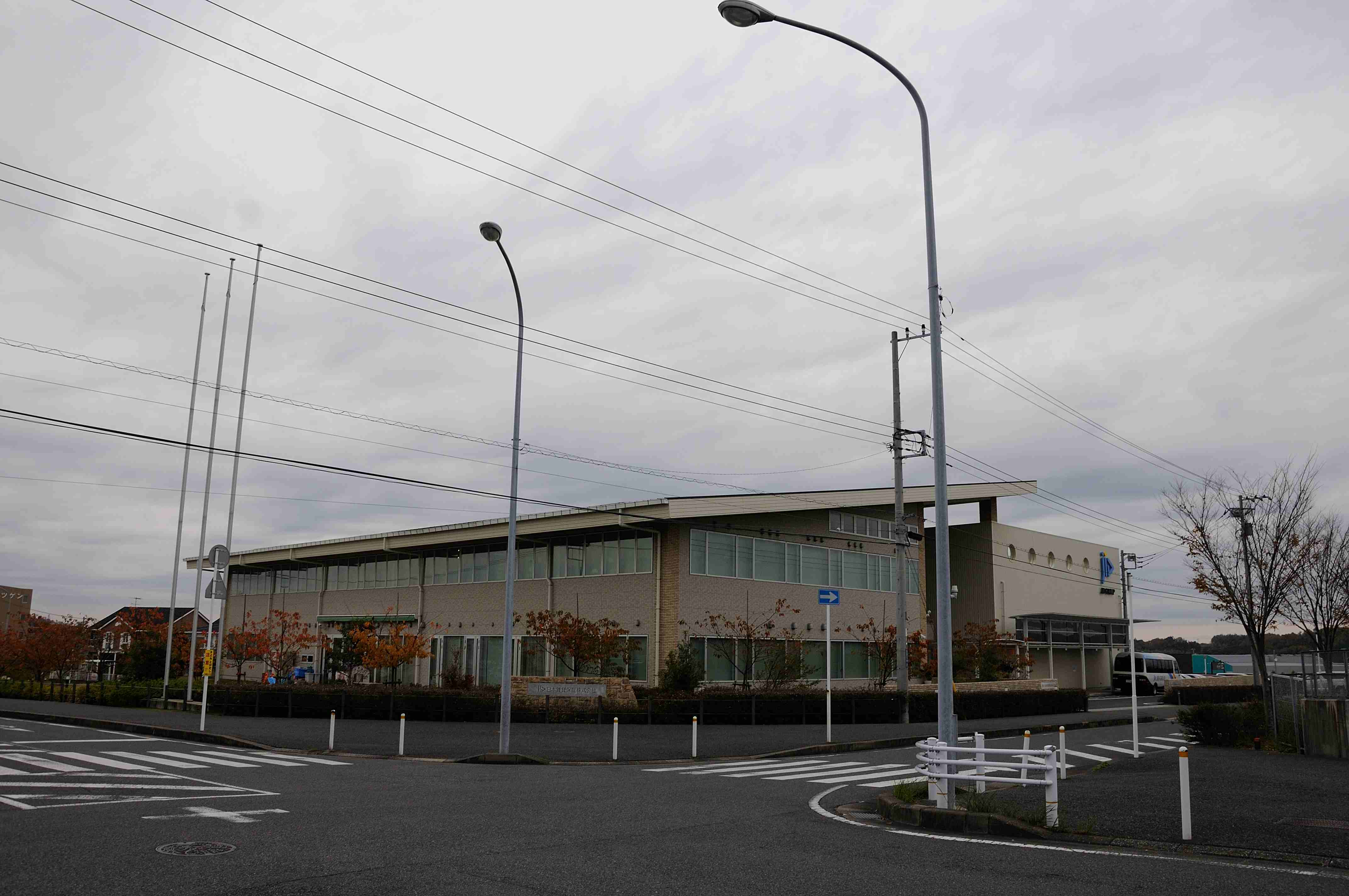 千葉県木更津市羽鳥野にある日本賃貸保証本社